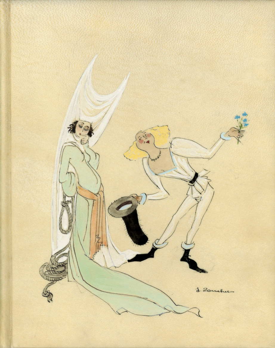 gouache originale